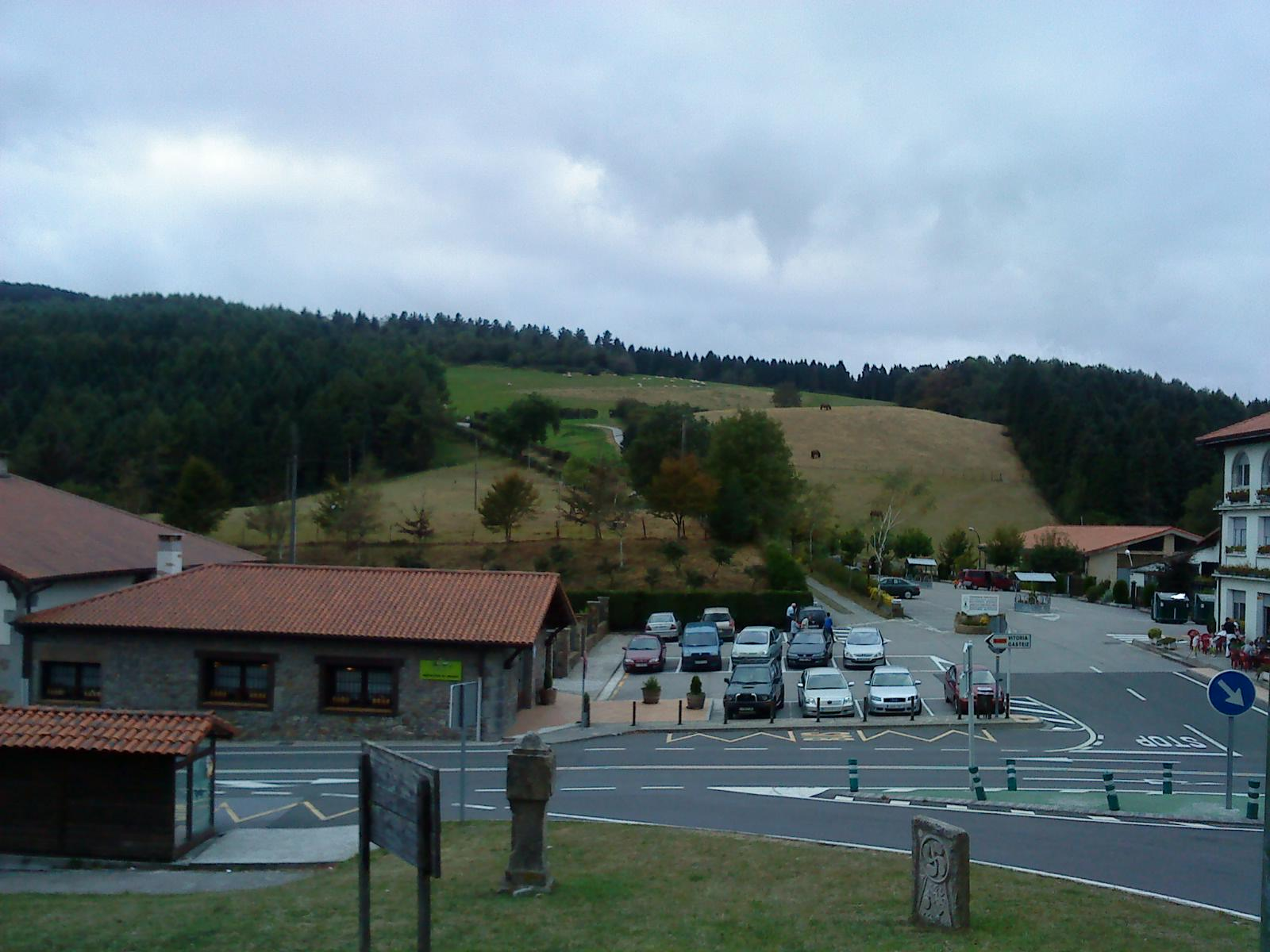 Vista del puerto de montaña a su paso por el Parque Natural de Urkiola en Bizkaia, País Vasco (España).